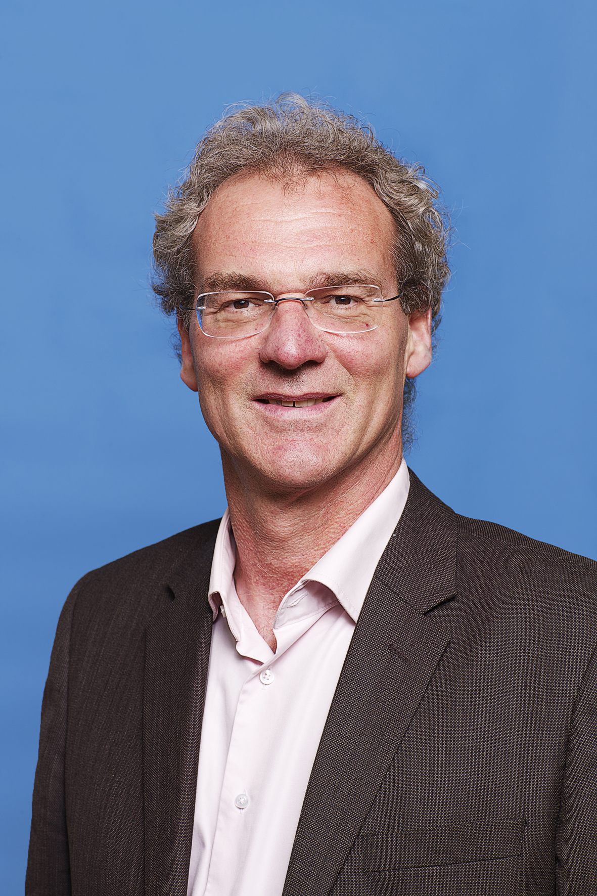 Tweede Kamerlid. Foto: Lex Draijer.